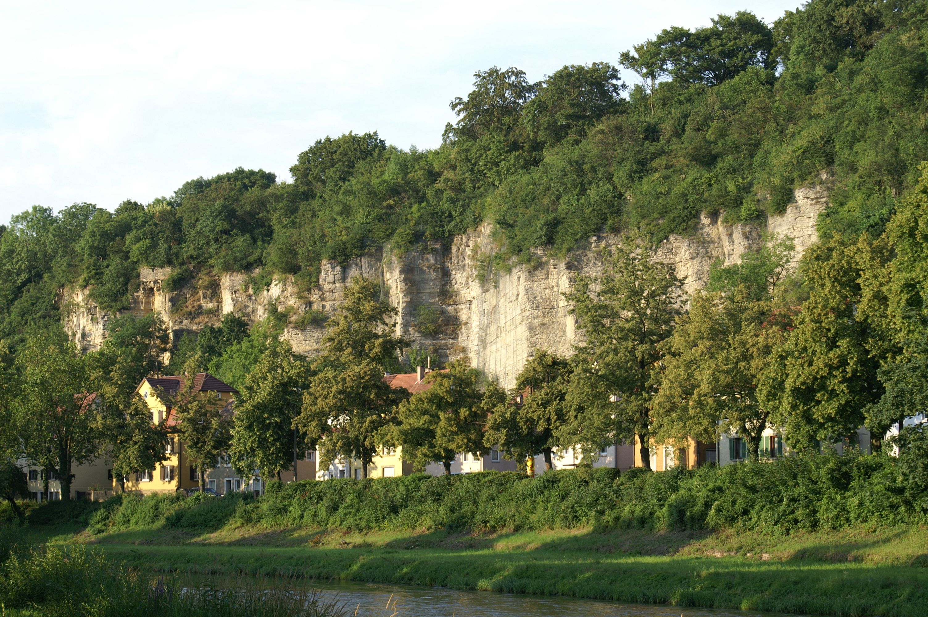 Der Mühlacker Stadtteil Dürrmenz zwischen Enz und steilen Felsen